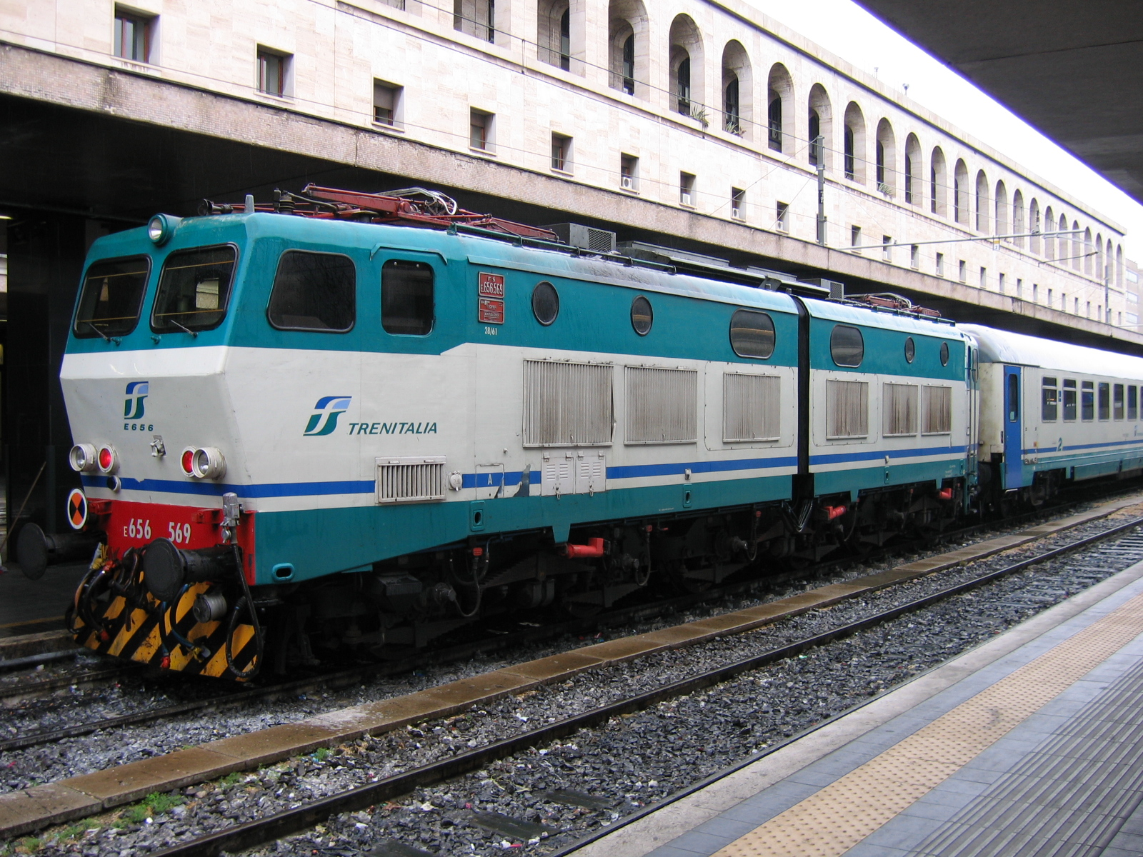 Locomotiva E.656.569 a Roma Termini